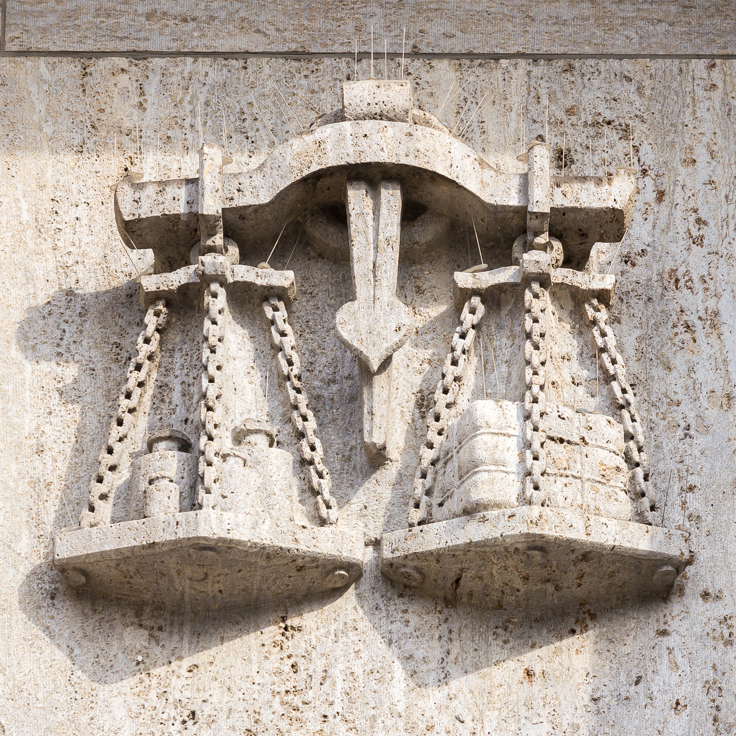 Büro- und Verwaltungsgebäude Von-Werth-Straße 14, Köln-Tierkreis-Reliefs von Willy Hoselmann Foto: Waage This is a photograph of an architectural monument.